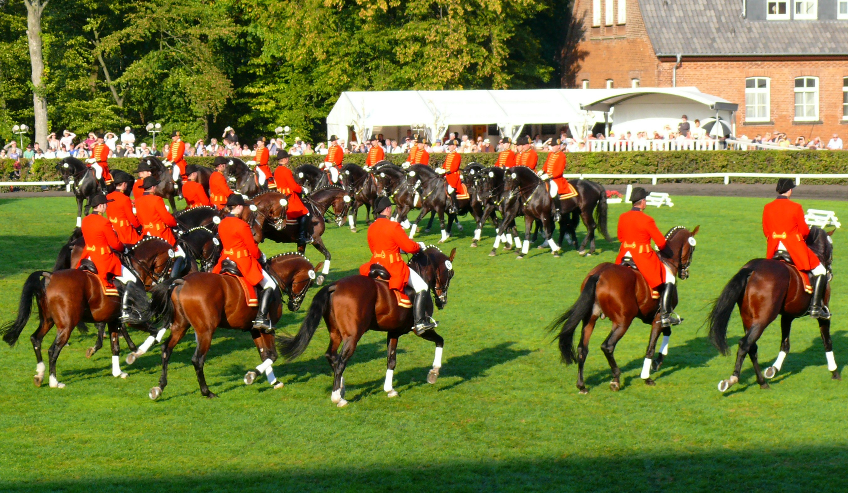 "Große Dressurquadrille" auf der Celler Hengstparade am 25.9.2011, 24 Hengste werden in verschiedenen Figuren auf dem Platz geritten.